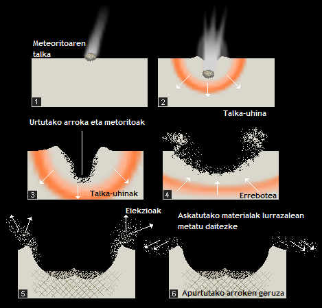 Talka krater bat nola sortzen den azaltzen duen irudia.